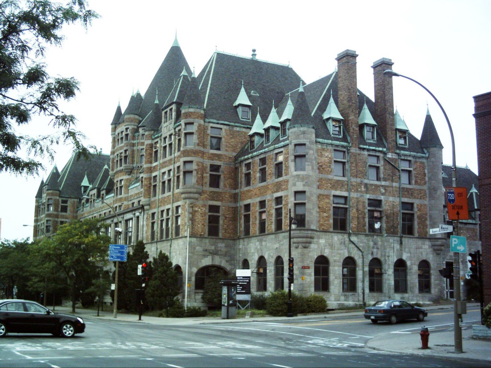 L'édifice Jacques-Viger, situé à l'angle des rues Saint-Antoine et Berri dans le Vieux-Montréal